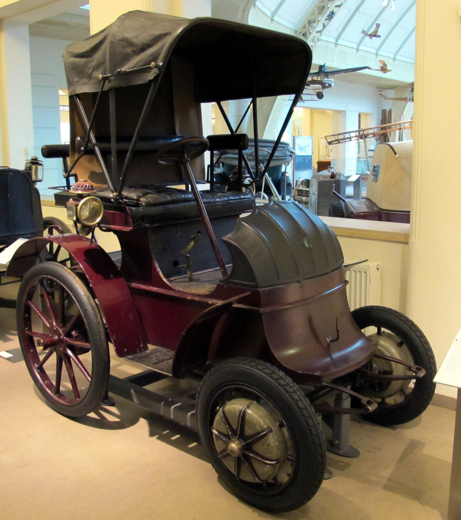 Lohner-Porsche-Elektromobil mit Antriebsmotoren in den Vorderrädern. Die schweren Vorderräder waren allerdings schwer zu lenken und wiesen ungünstige Fahreigenschaften auf. Dieses Fahrzeug hielt sich einige Jahre am Markt, verlor jedoch aufgrund mangelnder Speicherkapazität der Akkumulatoren gegen Benzinfahrzeuge. Akkumulator: Bleiakku mit 44 Zellen und ca. 80 V Gleichspannung. Betriebsdauer ca. 3 Stunden. Hersteller: Lohner-Porsche-Elektromobil Baujahr: 1900